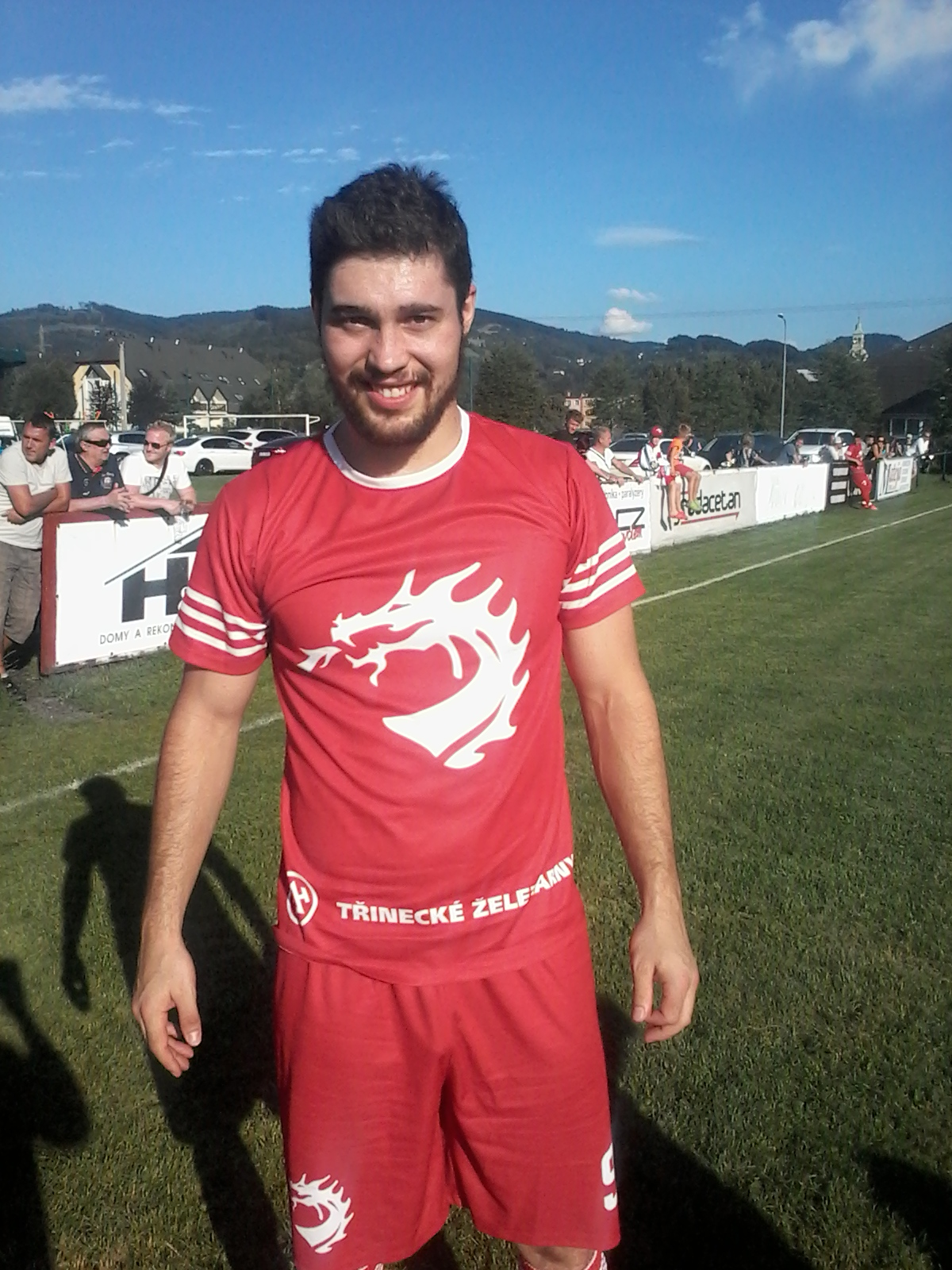 Bohumil Jank - 2.8.2016 v areálu bystřického fotbalového hřiště - přátelské utkání mezi výběrem HC Ocelářů Třinec a Fanklubu